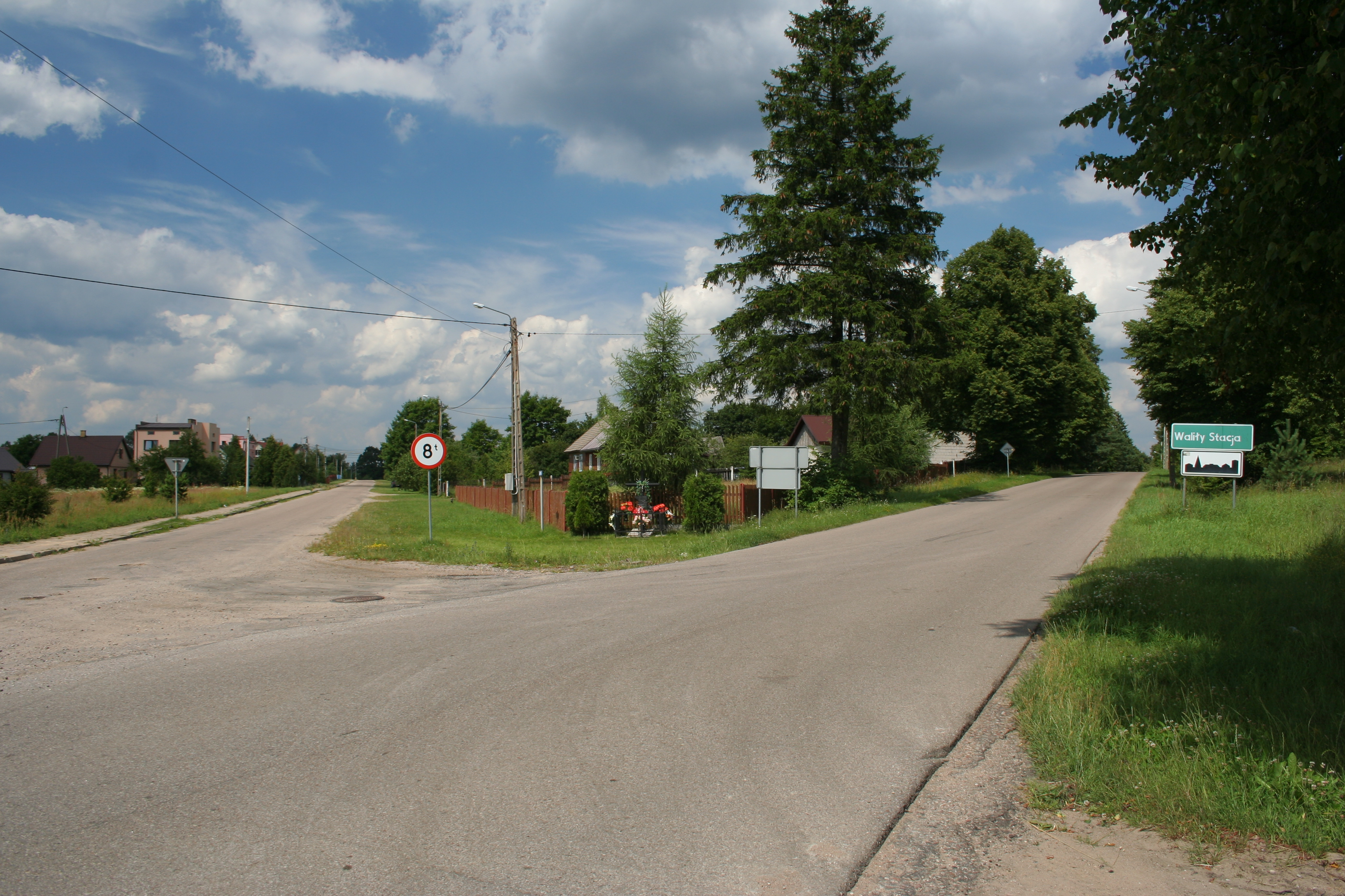 Droga wjazdowa do wsi Waliły-Stacja.